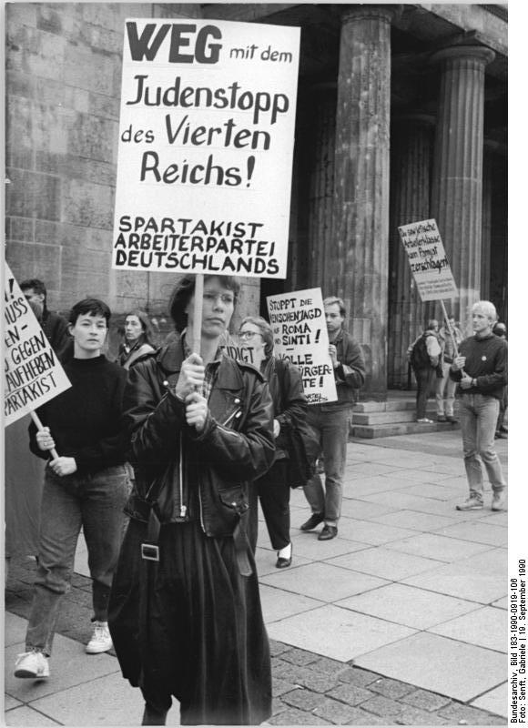 ADN-ZB Senft 19.9.90 Berlin: Protest gegen den "Judenstopp des Vierten Reiches" legten vor dem Mahnmal Unter den Linden Mitglieder der Spartakist-Arbeiterpartei ein. Sie wenden sich gegen den Beschluß der Bundesregierung, ein Einreiseverbot für sowjetische Juden zu verhängen. Mit einer Unterschriftensammlung - sie müßte 2.000 Stimmen erbringen - bemüht sich die Partei um Zulassung zur Wahl.